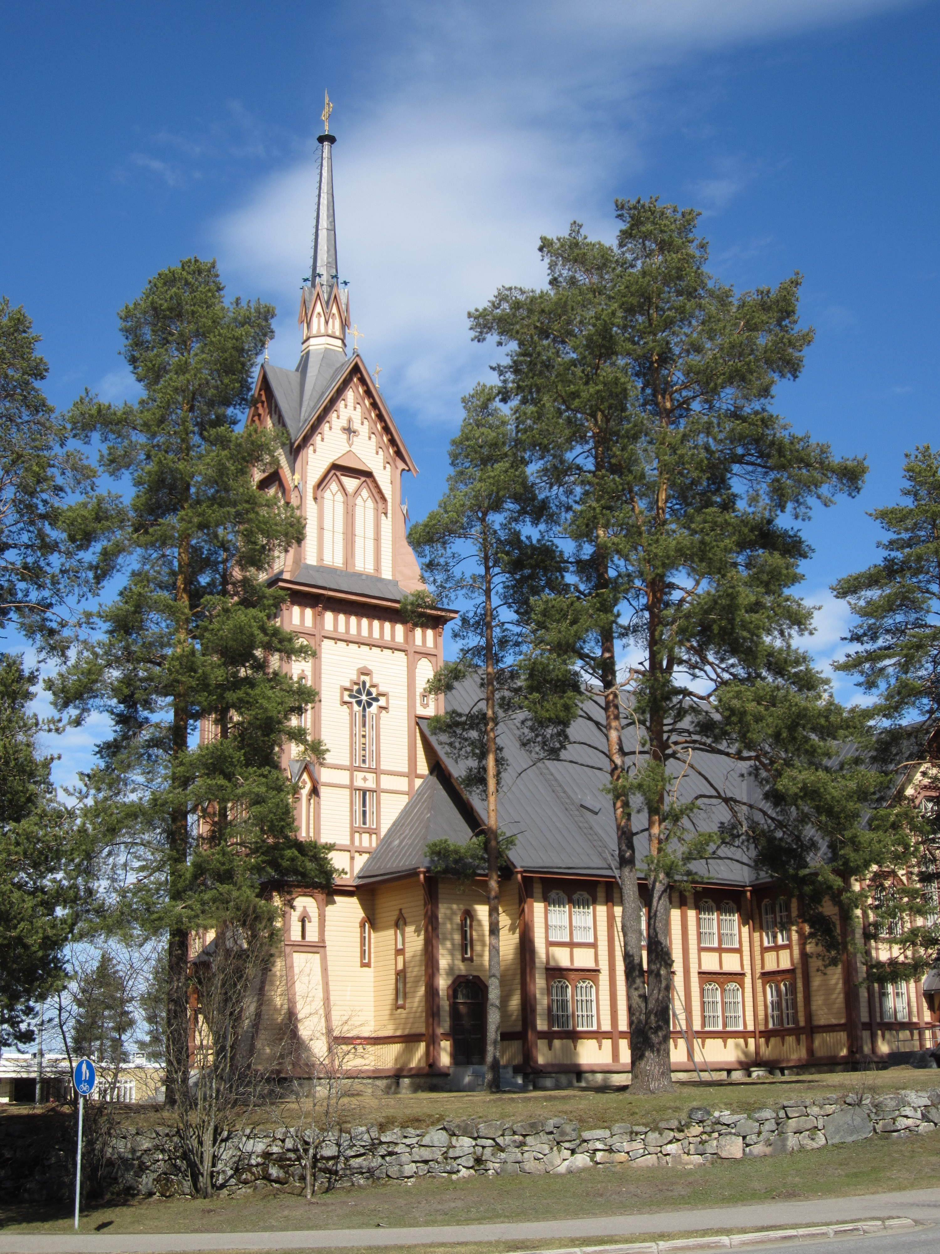 Lapinlahden kirkko